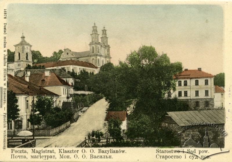 Василіяни, Палацовий міст, поч. вул. Шкільної, Бучач